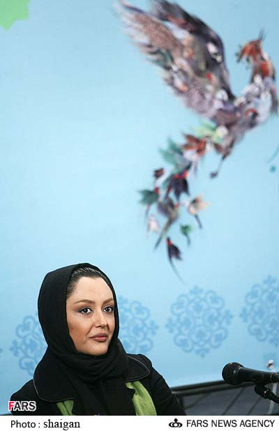 در نشست خبری فیلم وقتی همه خوابیم، بیست و هفتمین دوره‌ی جشنواره‌ی فیلم فجر